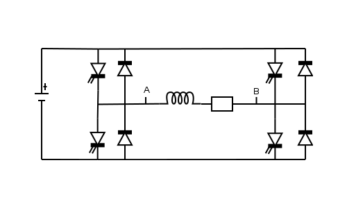 Schéma de principe d'un onduleur de tension monophasé (réalisé avec Dia 0.97.2)